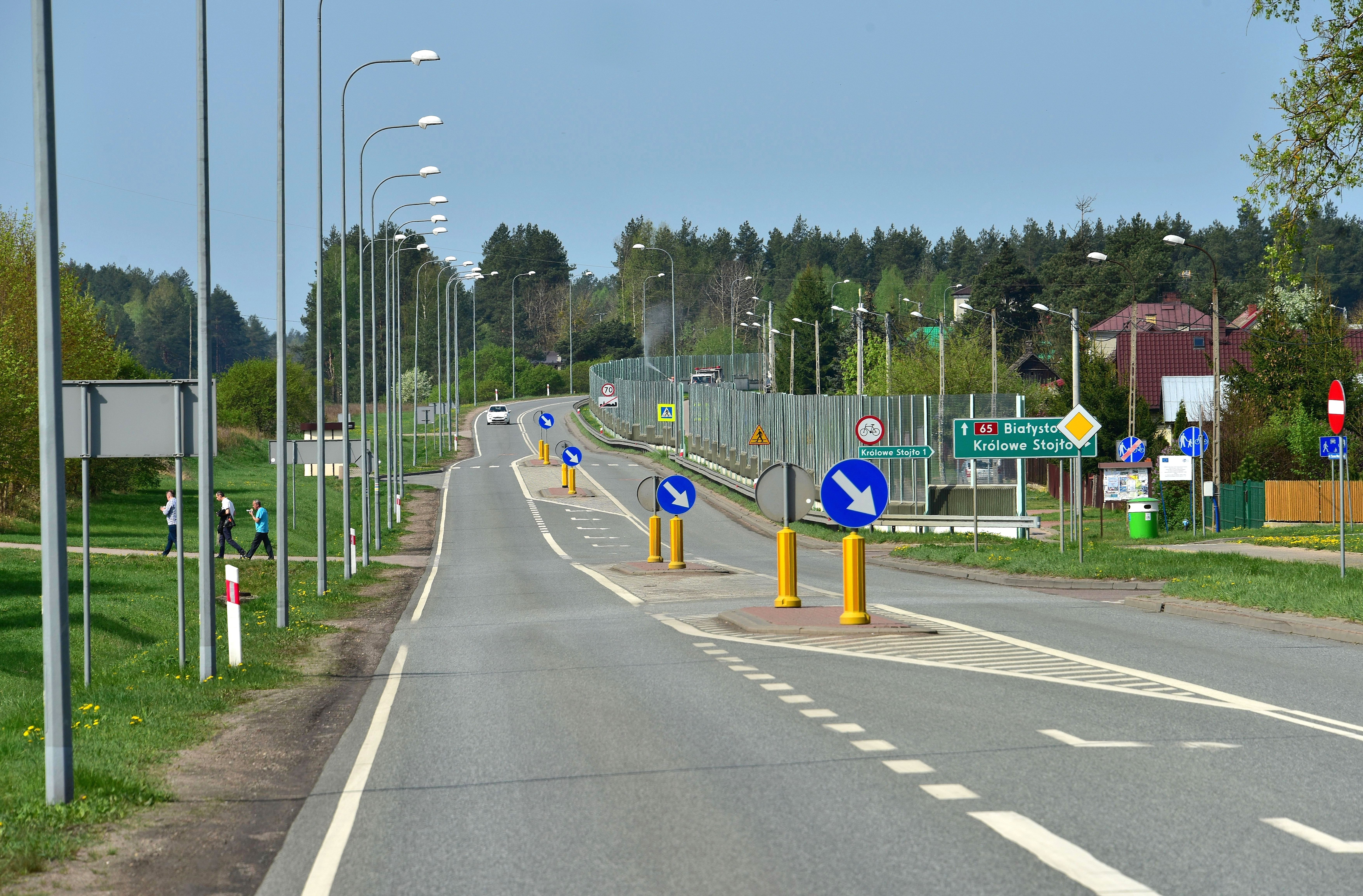 Waliły-Stacja gmina Gródek, województwo podlaskie